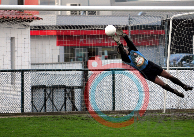 Defesa do Guarda-Redes Rodrigo ao serviço do C.F. "Os Marialvas"